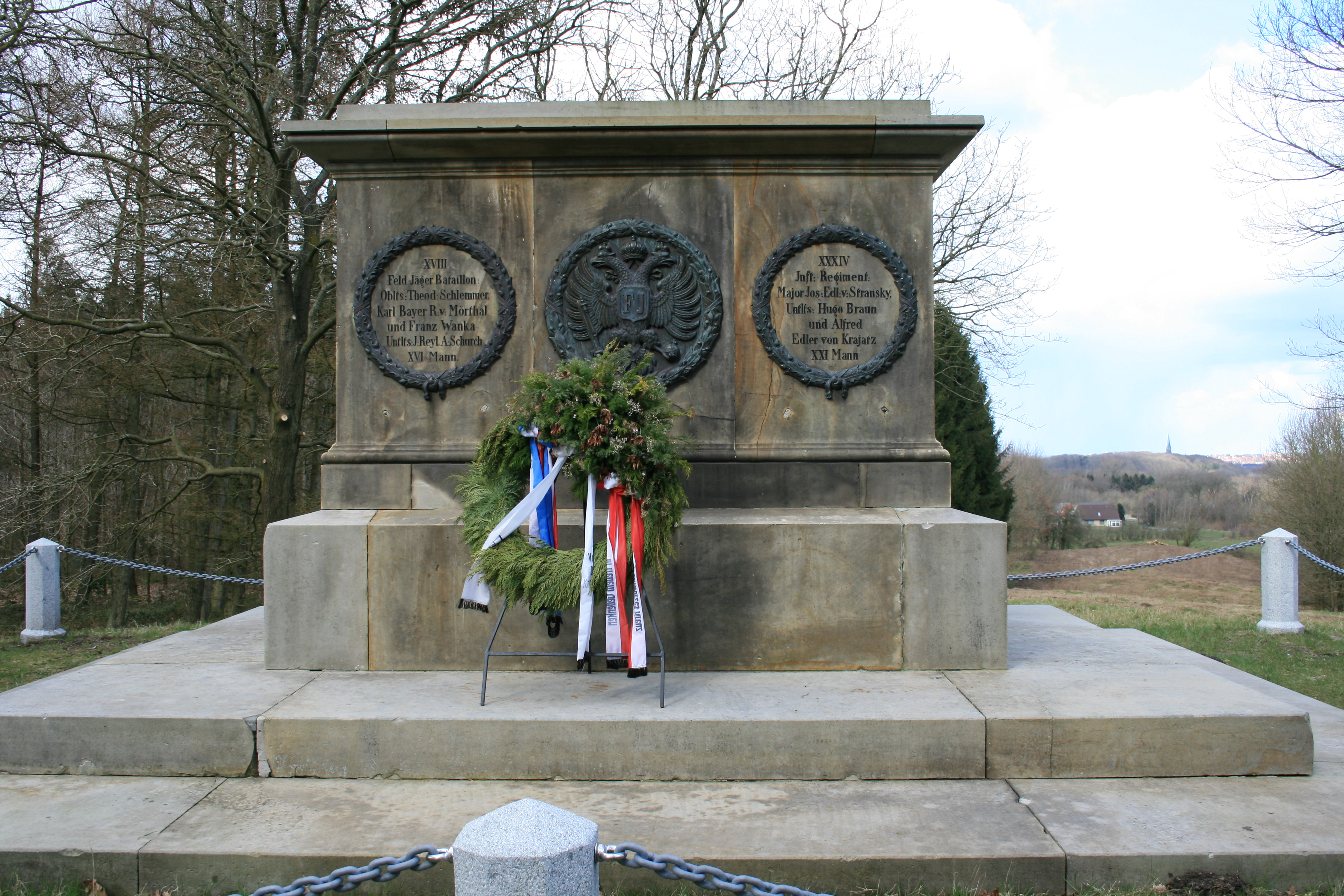 Koenigshuegel Denkmal links